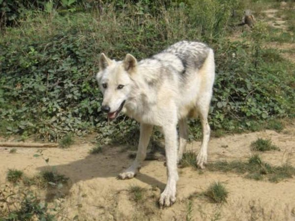 Loup blanc de l'Arctique